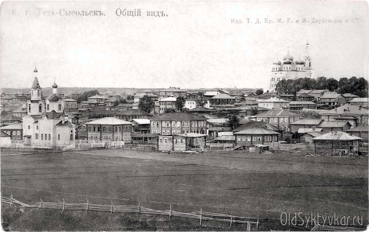 Усть-Сысольск в начале XX века - Общий вид